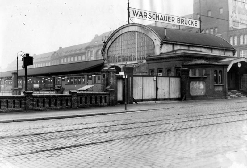 Berlin, Bahnhof Warschauer Strasse 30 Jahre Hochbahn Heute (15.2.) ist die Berliner Hochbahn 30 Jahre alt U.B.z. den ältesten Hochbahnhof der Reichshauptstadt "Warschauer Brücke" 4703-32 ADN-Text: ADN-ZB/Archiv Berlin, Februar 1932 Der Bahnhof Warschauer Strasse ist der älteste der Hochbahn. 4703-32